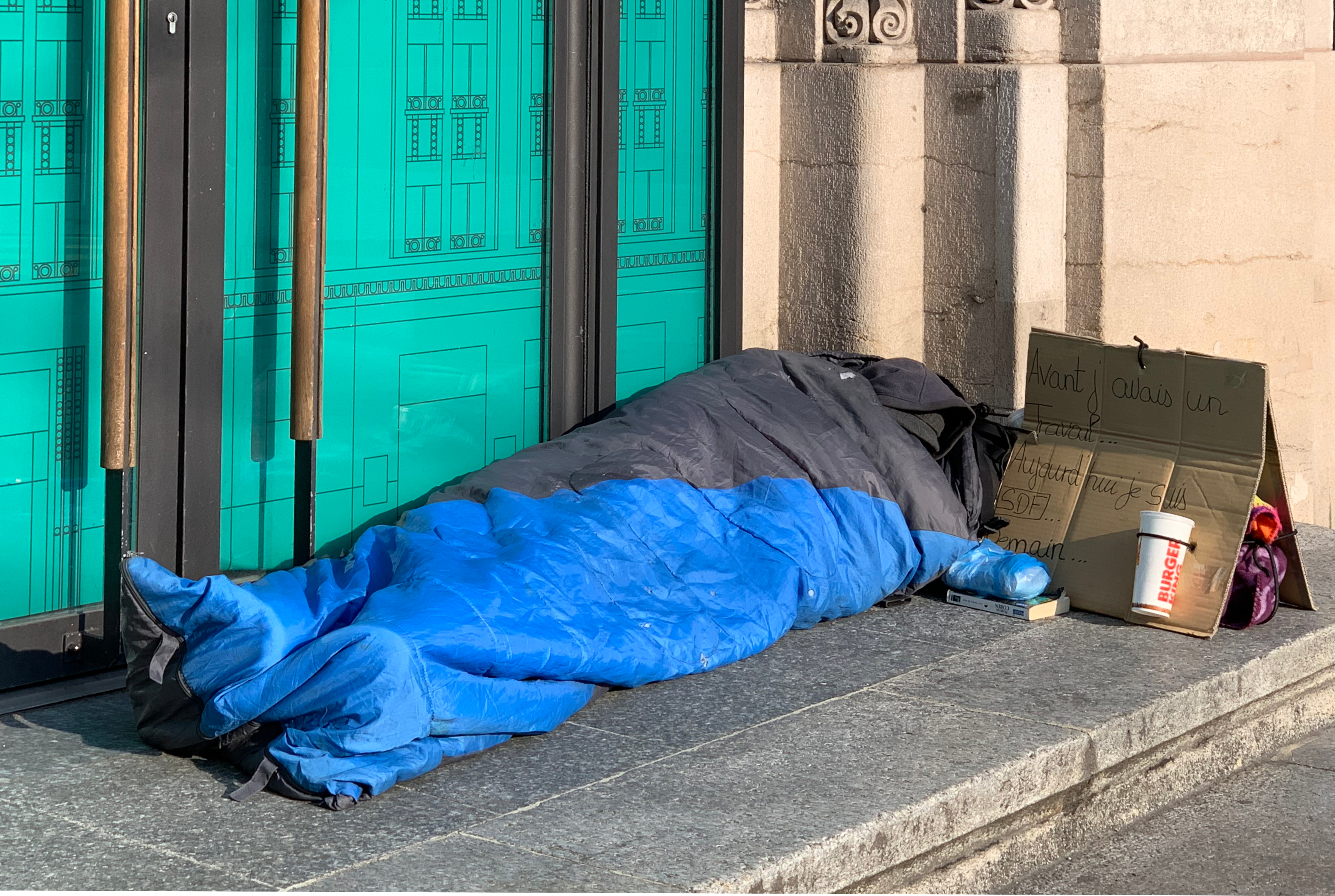 Un sans-abri dans un duvet dans le centre-ville de Lausanne (Suisse). Inscrit sur le carton : Avant j'avais un travail, aujourd'hui je suis SDF, demain...